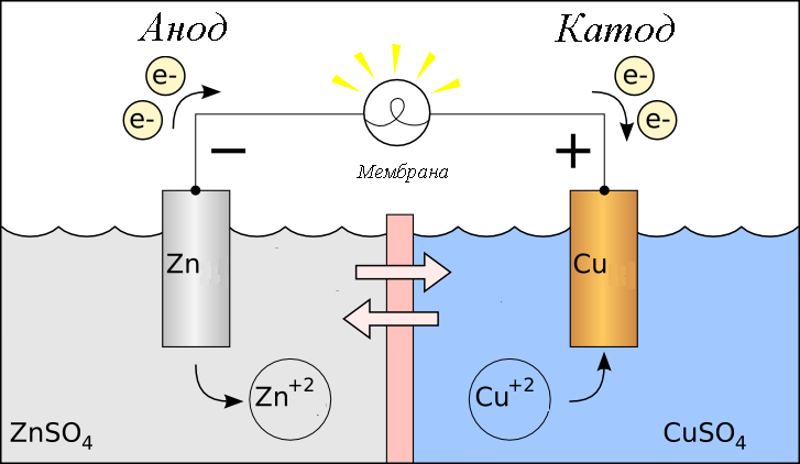 Схема гальванического элемента Даниэля-Якоби